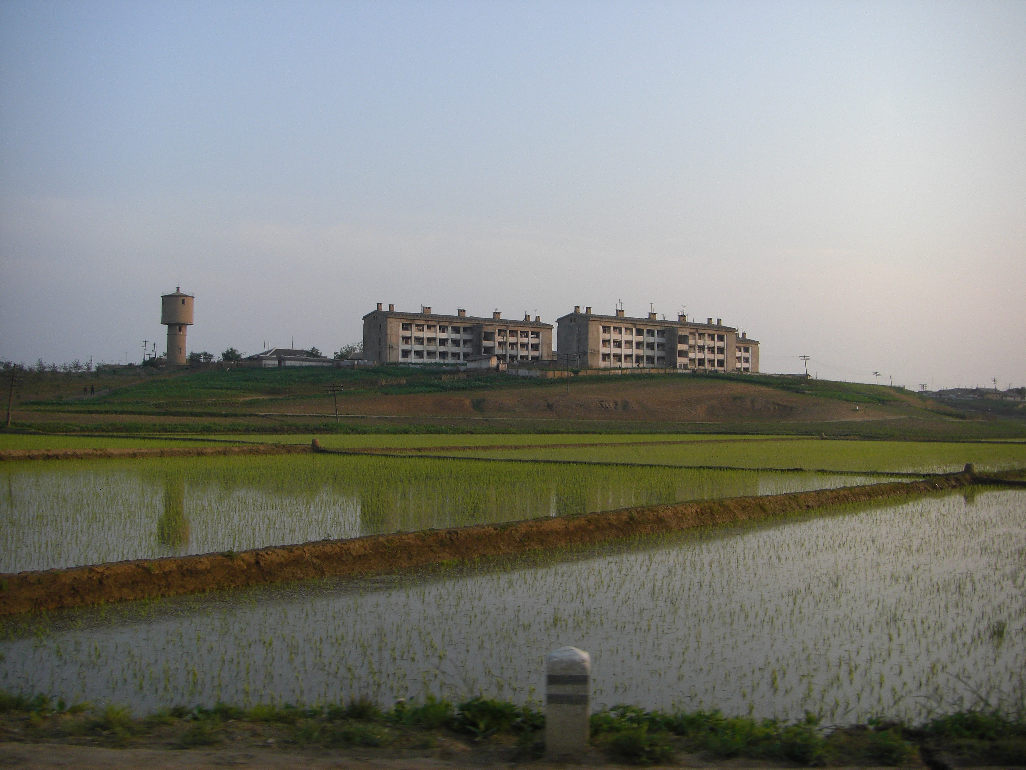 Ryonggang-gun, North Korea.